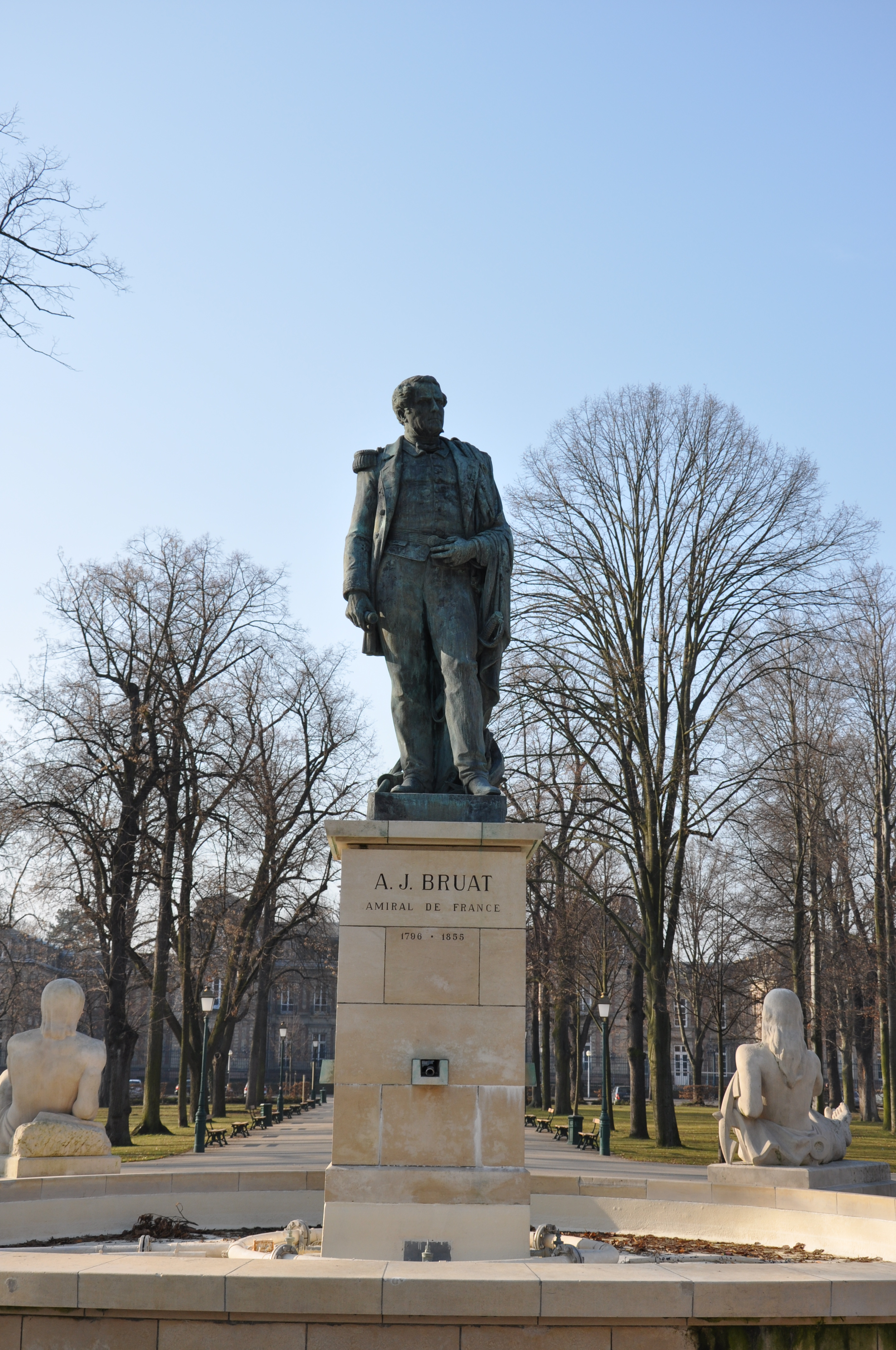 A.J.Bruat Amiral de France (1796 - 1855); Place du Champs de Mars